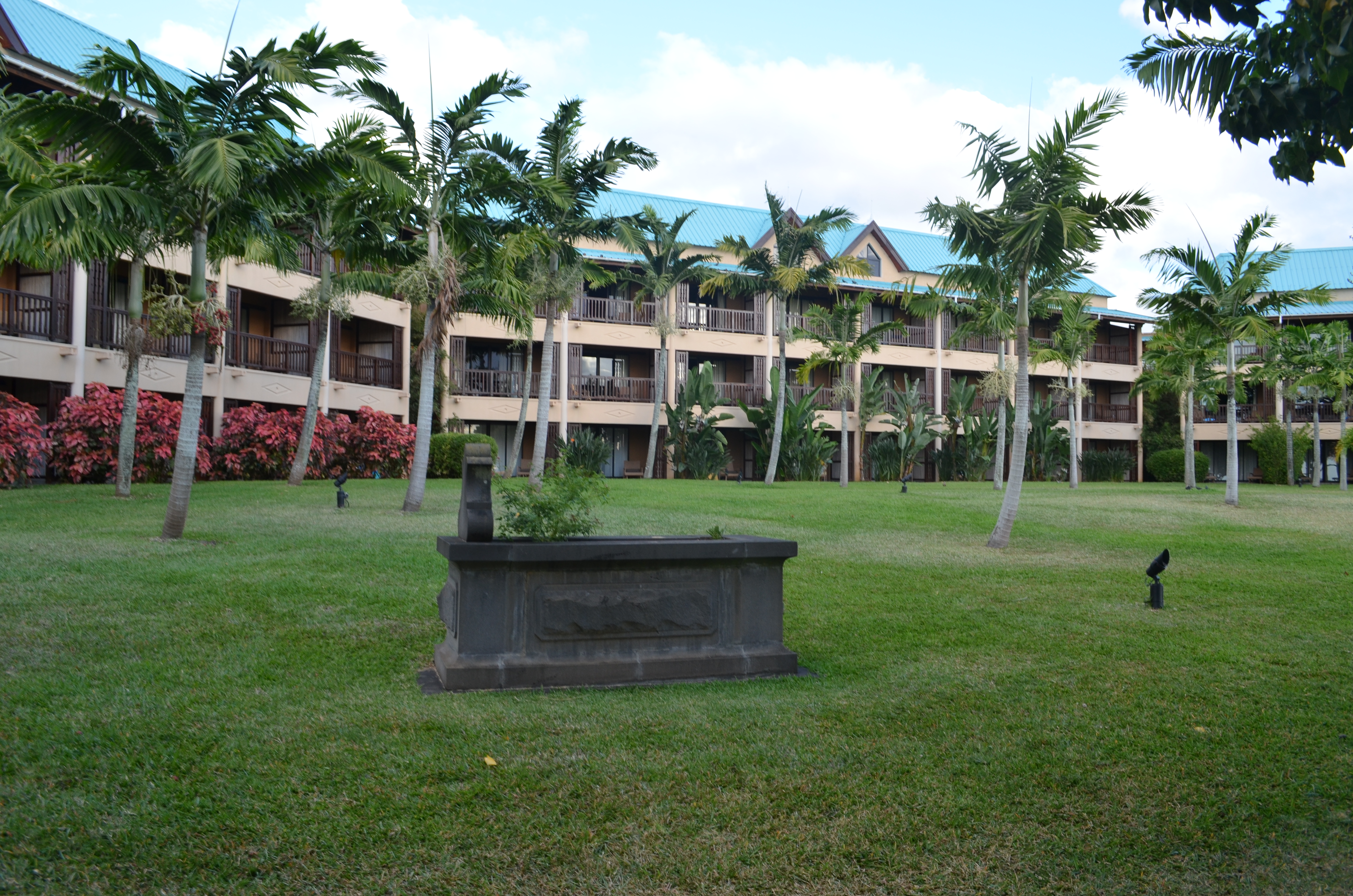 Pointe aux Canonniers, Club Med, Grave Goumany